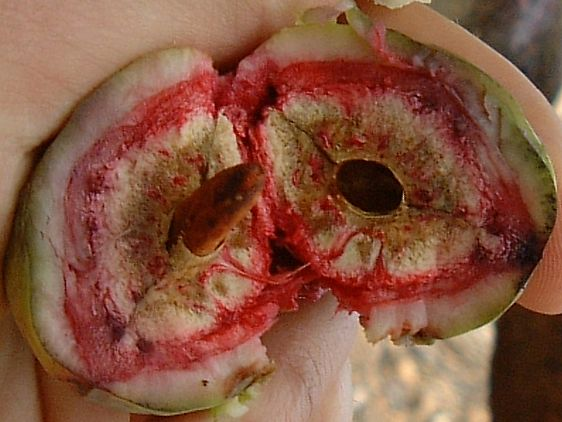 tonka bean uncertain